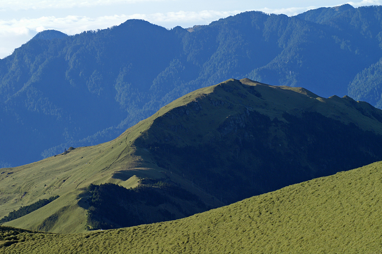 Mountain Nan Hua 南華山